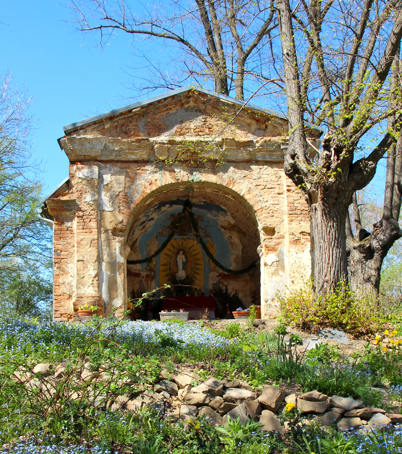 Die Kapelle der Heiligen Anna in Pelhřimovy, Tschechien.